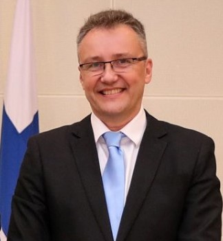 Präsident Francisco Guterres nimmt die Akkreditierung der neuen Botschafter in Osttimor entgegen: Finnland: Jari Sinkari Vereinigtes Königreich: Owen John Jenkins Polen: Beata Stoczynski Tetun: Prezidente Repúblika Francisco Guterres Lú Olo, ohin, simu karta kredensiál husi Embaixadór Finlandia, Jari Sinkari, Embaixadór Reinu Unidu, Owen John Jenkins, no Embaixadora Polónia, Beata Stoczynski atu hametin liután kooperasaun no amizade ho Timor-Leste.